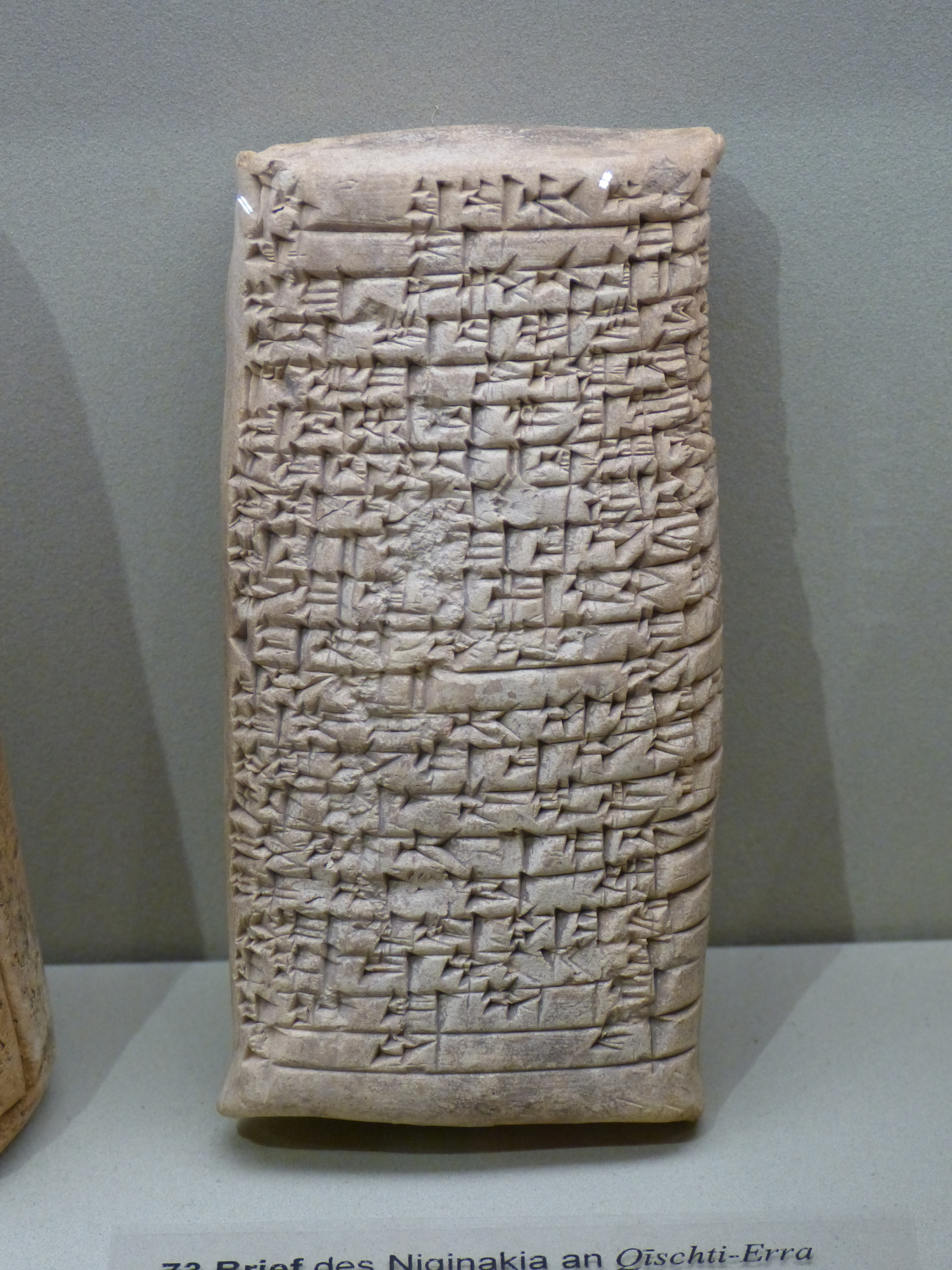 Museum der Universität Tübingen